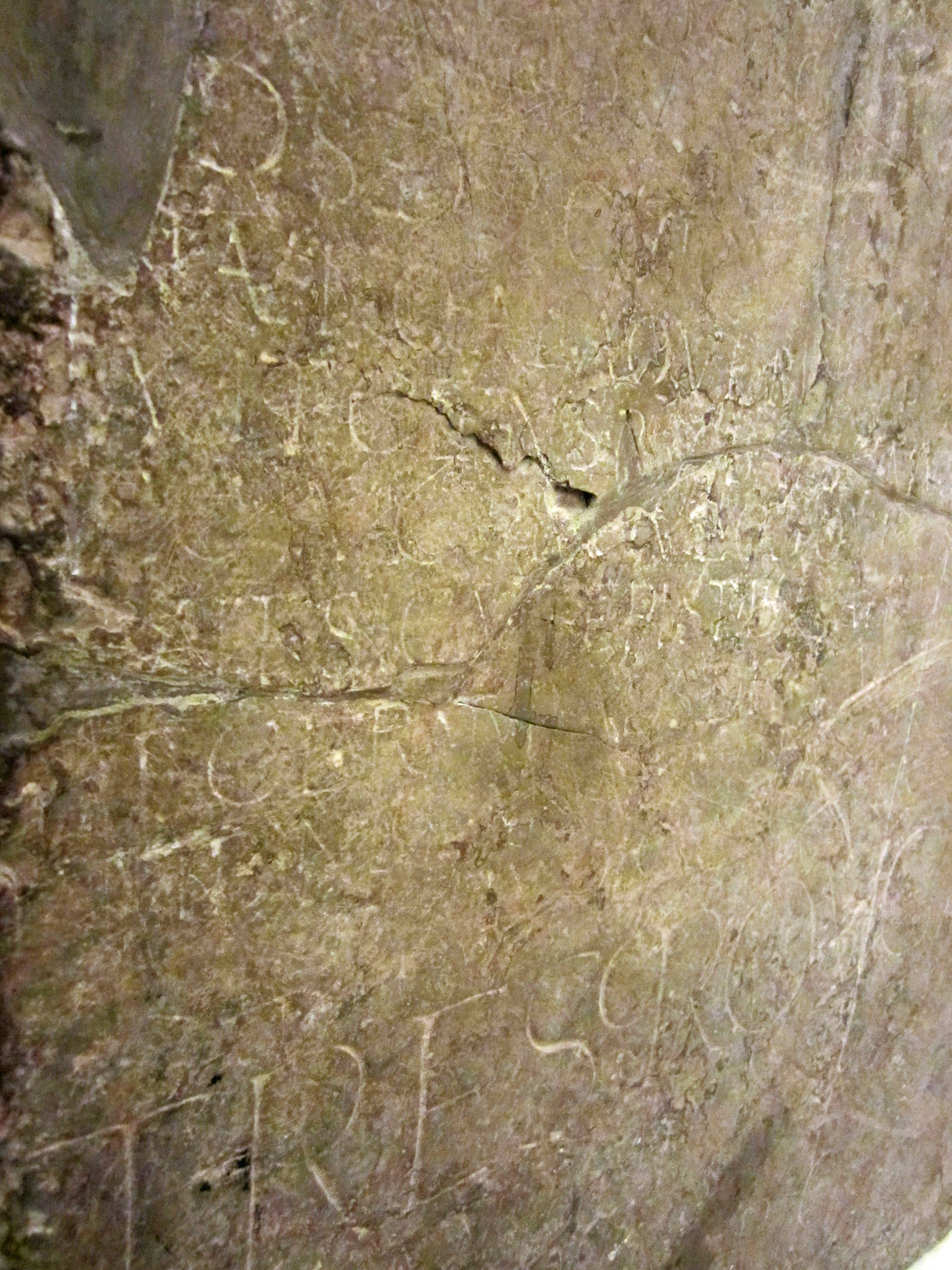 Marbre de Thorigny